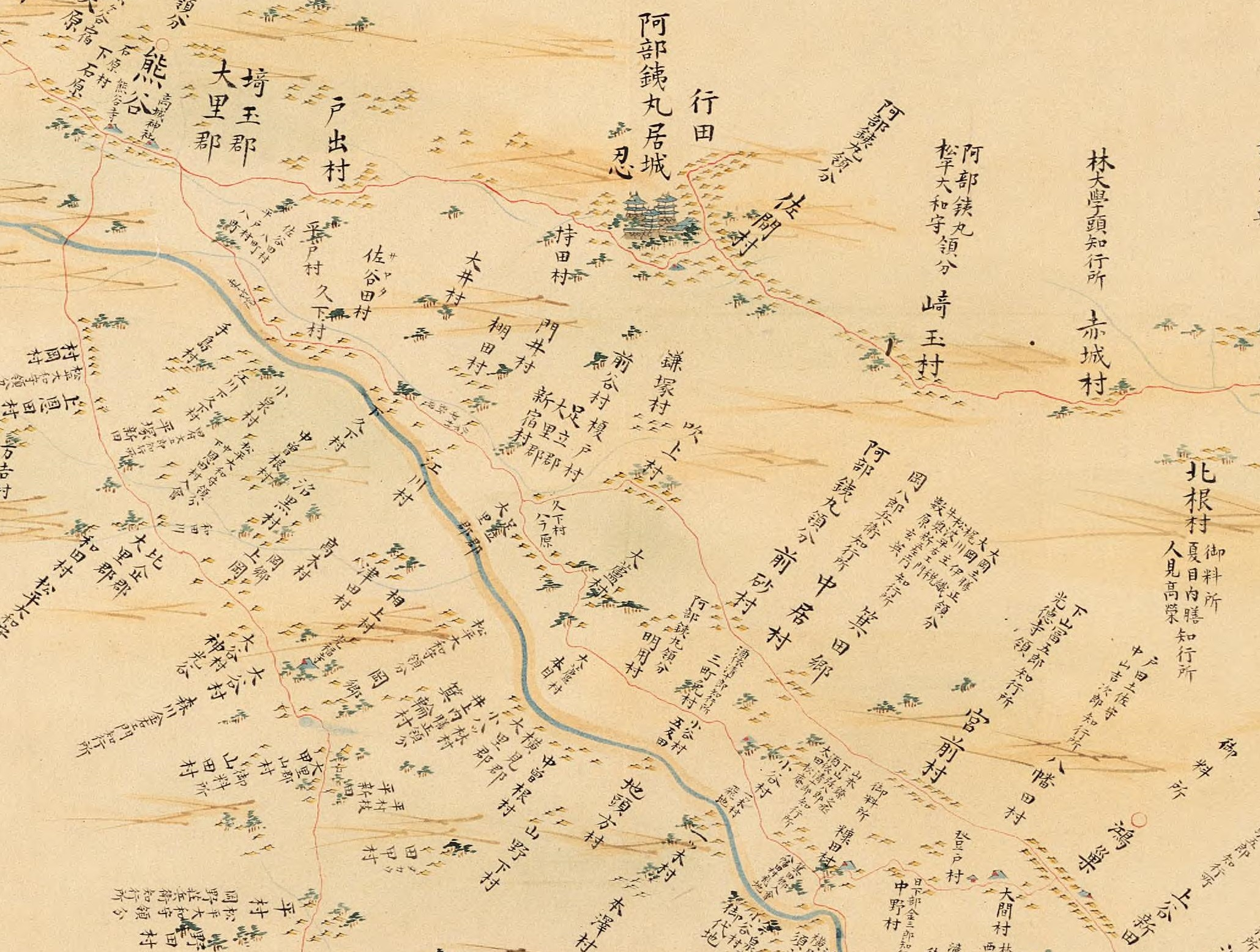 吹上村周辺 〔大日本沿海輿地全図 〕. 第88図 武蔵(武蔵・千住・忍・菅谷村)